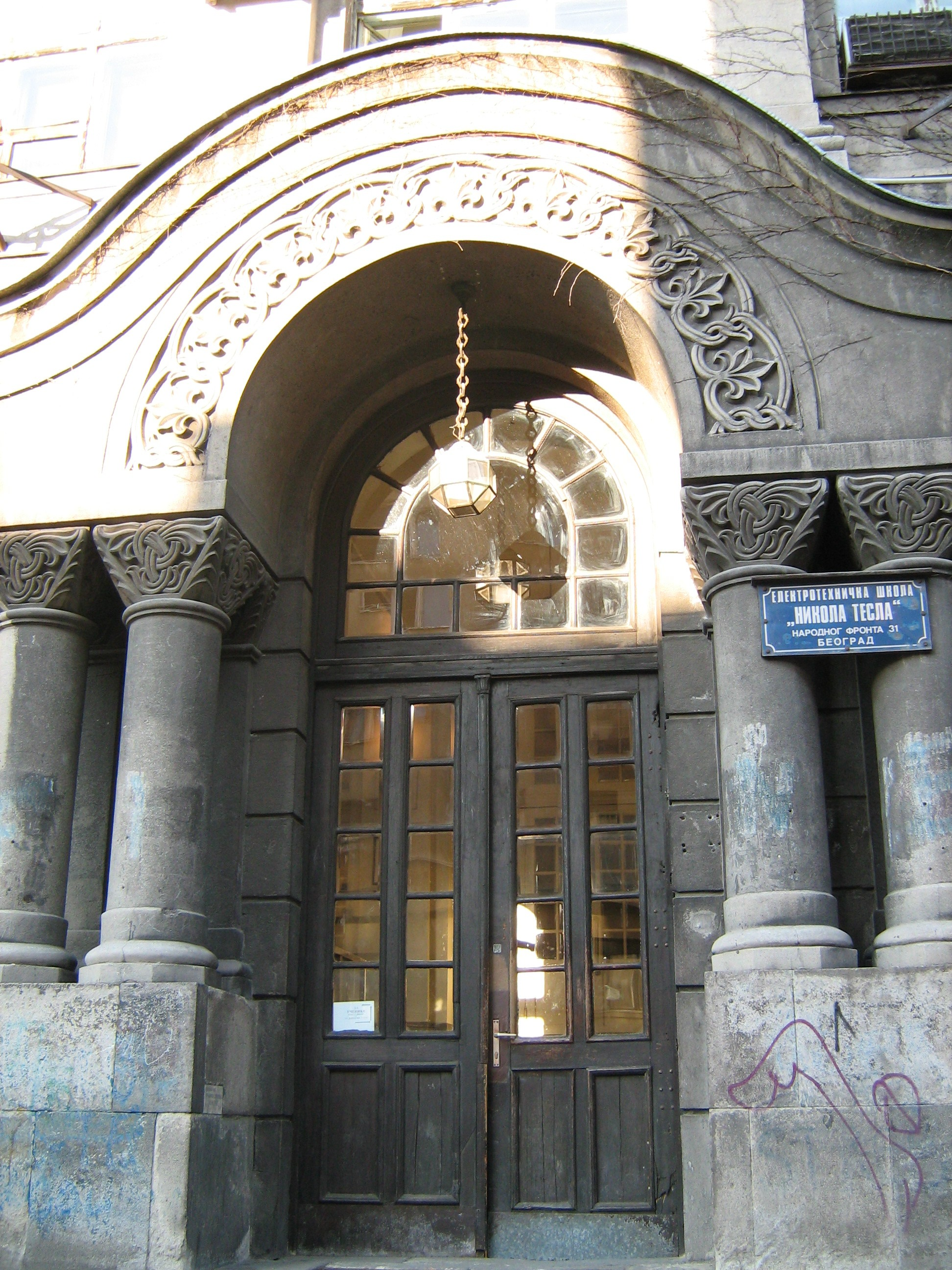 Улаз у школу